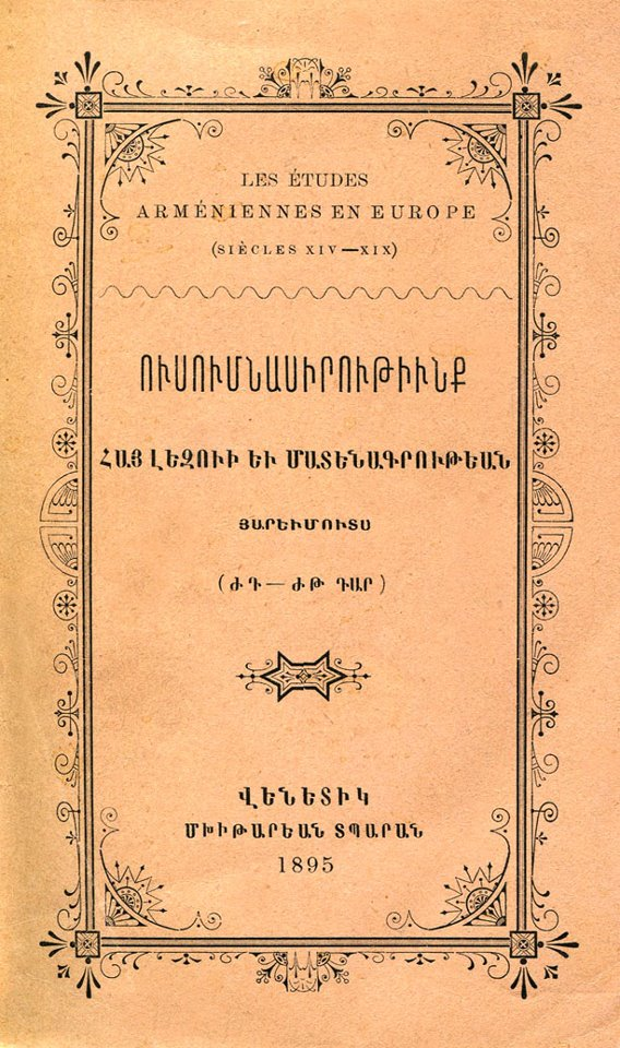 Ուսումնասիրութիւնք հայ լեզուի եւ մատենագրութեան յԱրեւմուտս (ԺԴ-ԺԹ դար)